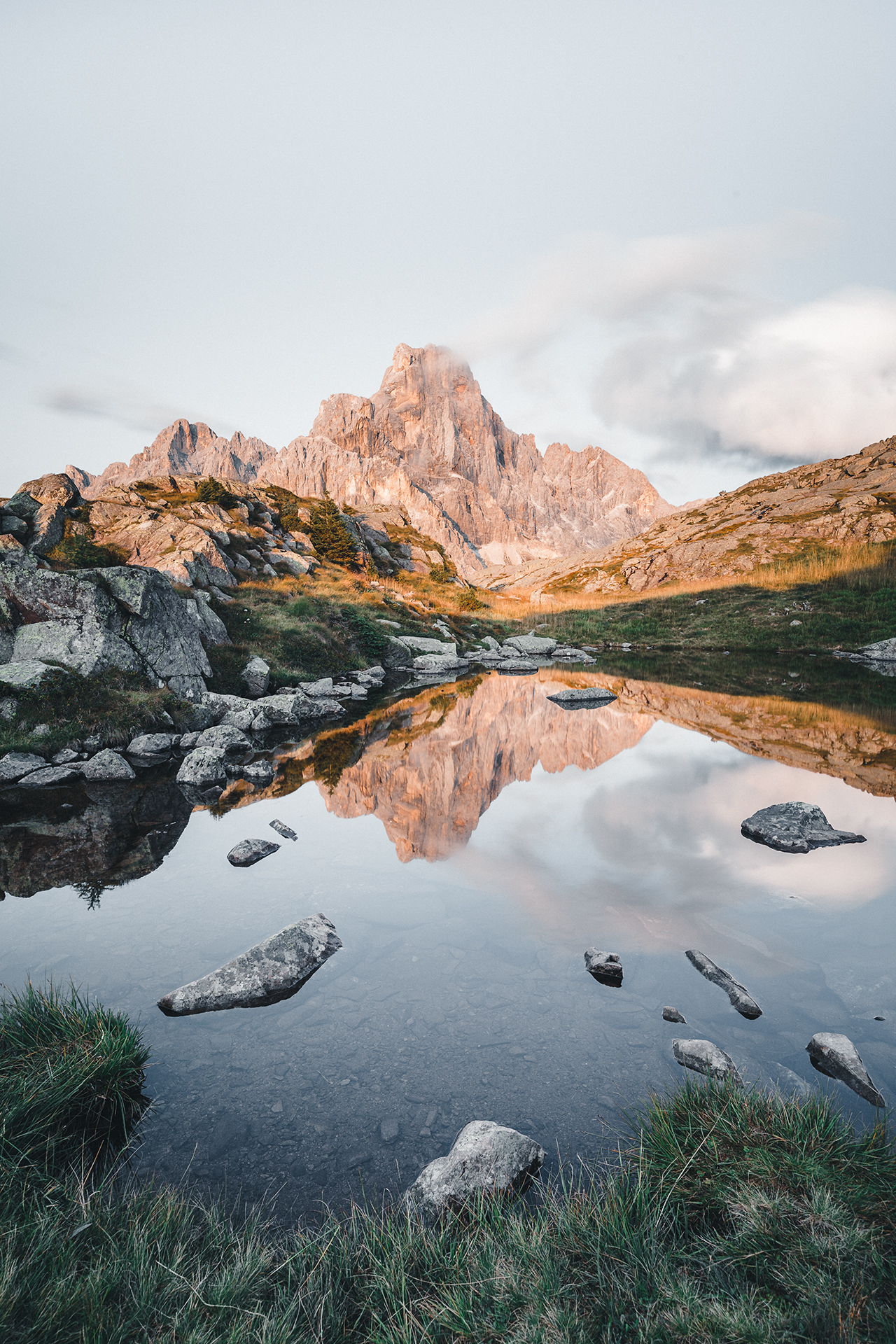 Parco naturale Paneveggio - Pale di San Martino (Q267909)